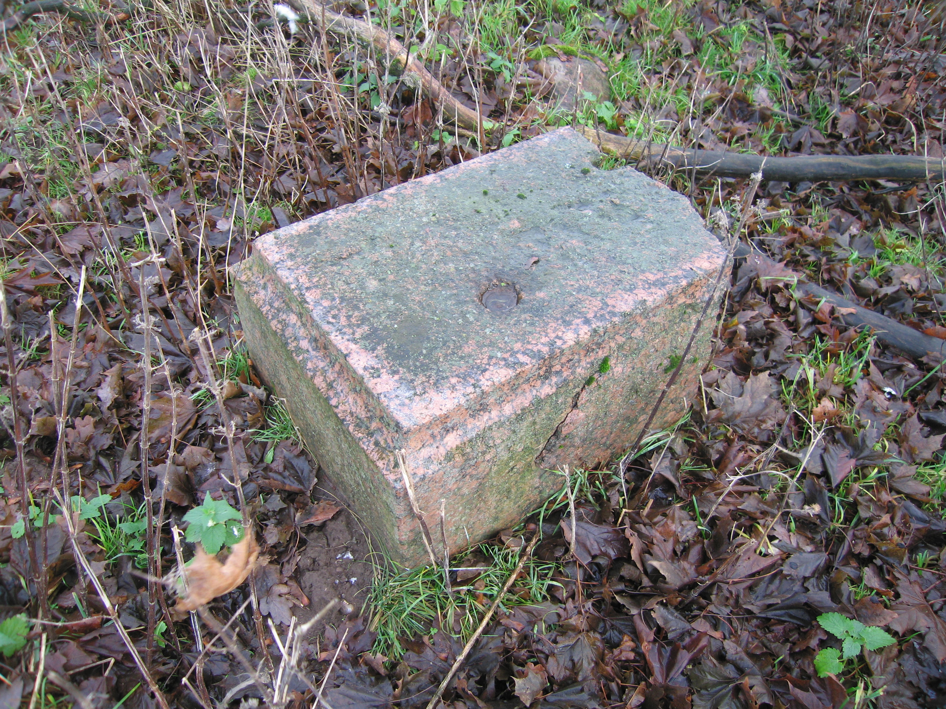 Hauatähise osa kalmistul